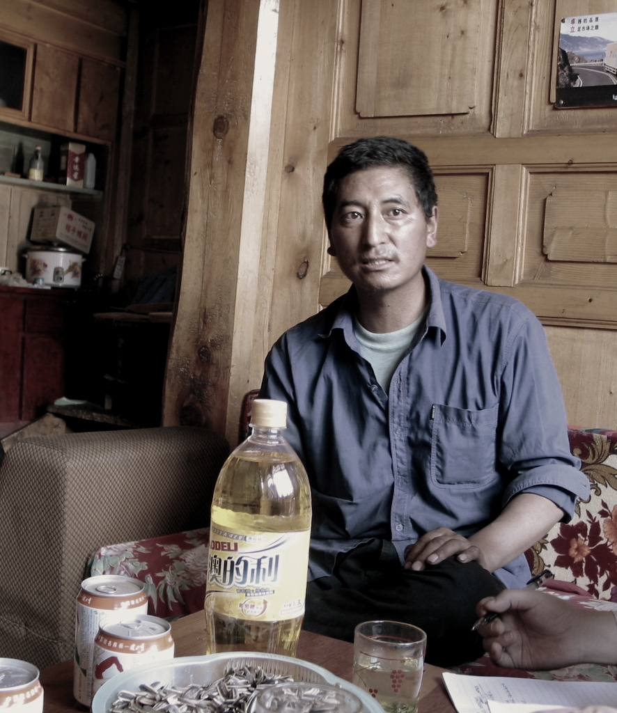 Near Ruoergai